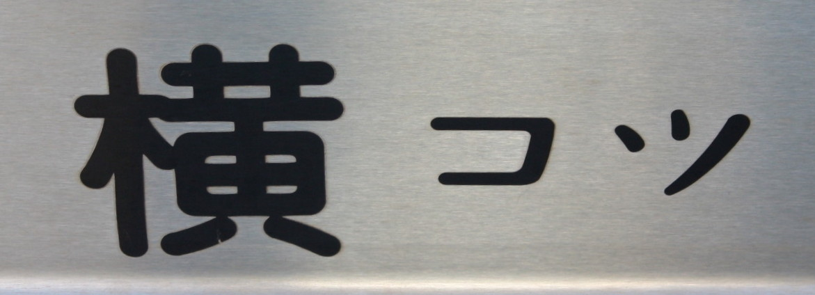 国府津車両センター所属表記 横コツ